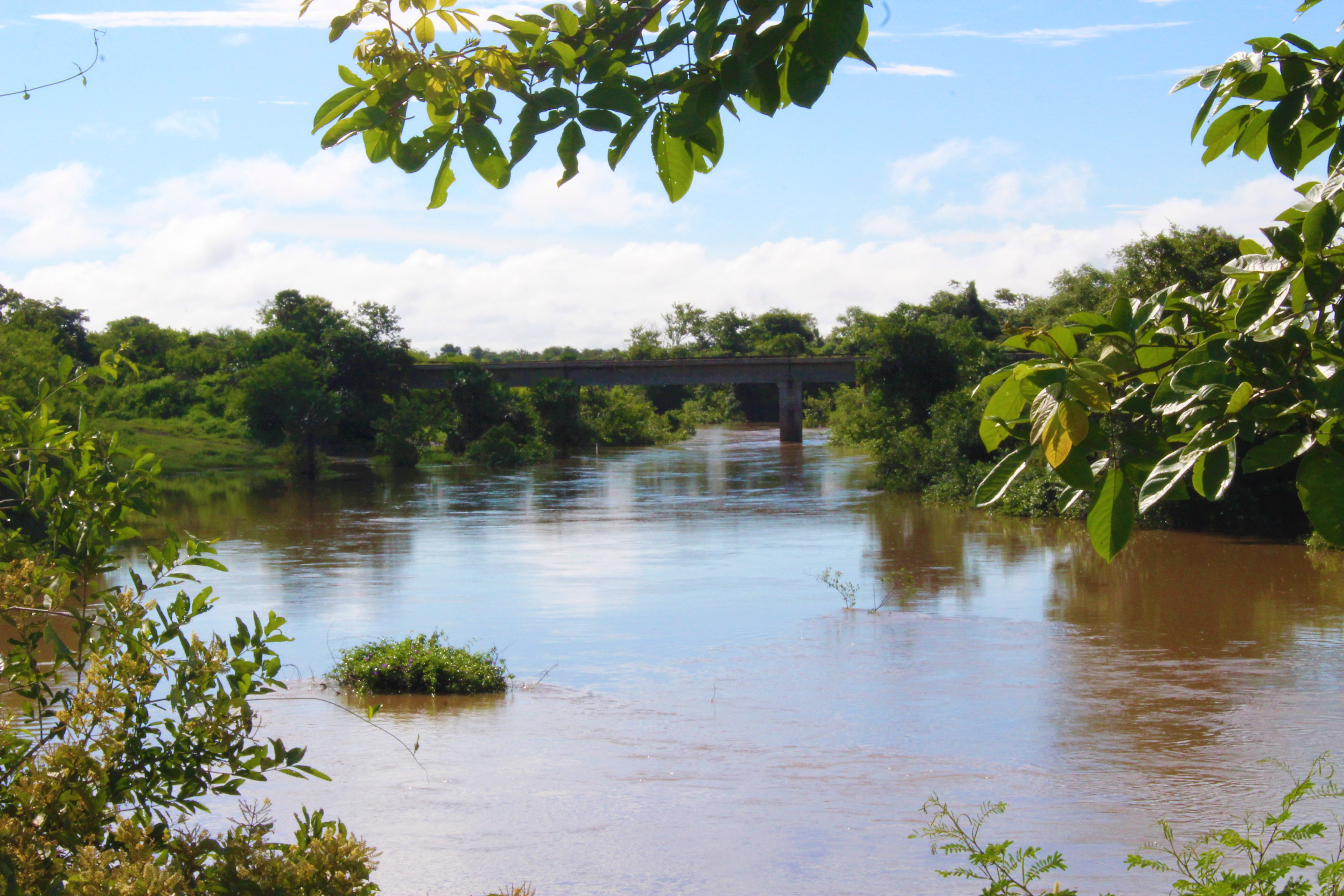 Vista da ponte ferroviária sobre o Rio Jenipapo, em Campo Maior, da antiga Estrada de Ferro Central do Piauí.